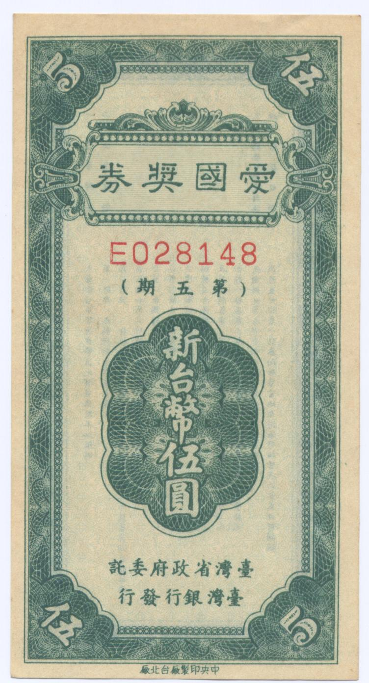 中文（台灣）: 中華民國第五期愛國獎券，民國39年期間發行。